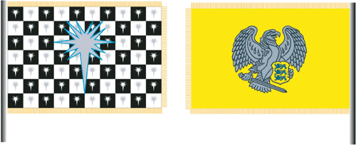 Kaitseliidu Tartu maleva lipp